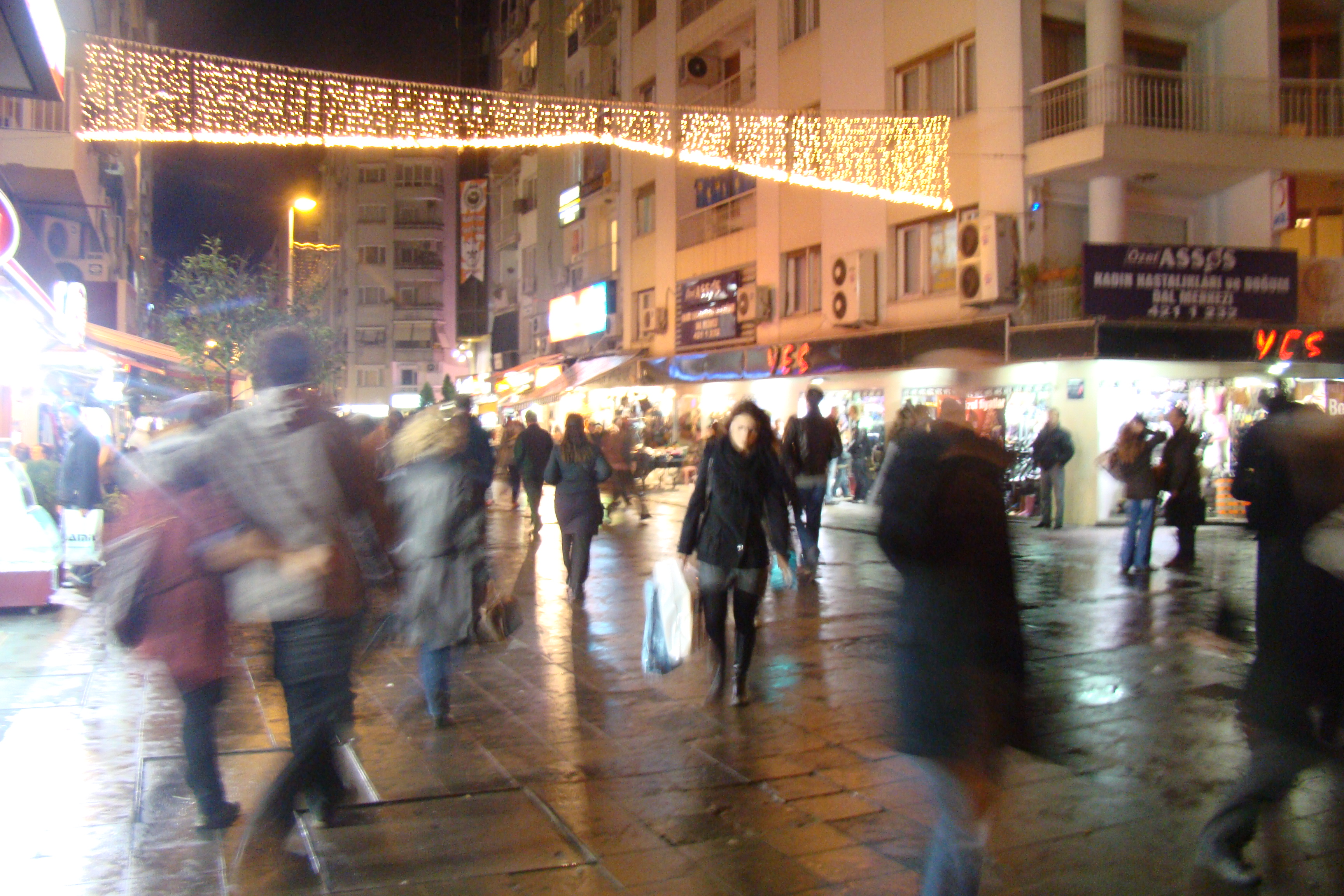 Kendi resmim...